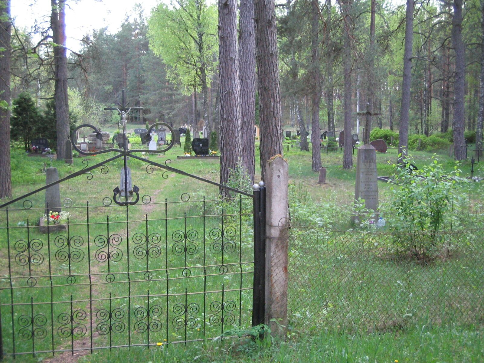 Kaimo kapinaitės.